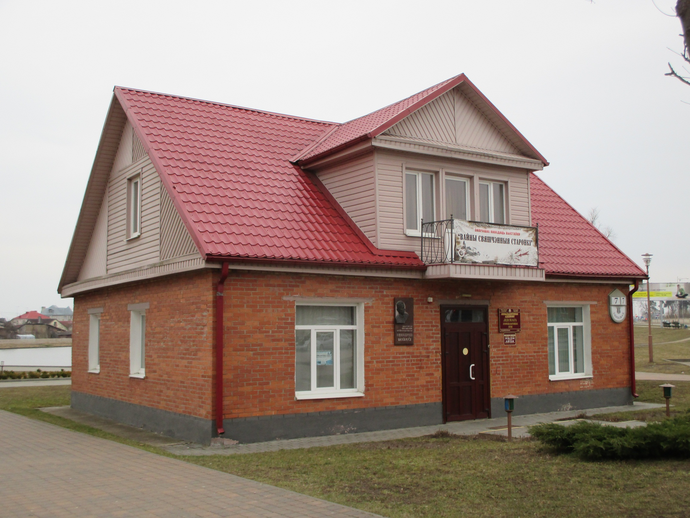 Беларусь, Ліда, дом Таўлая